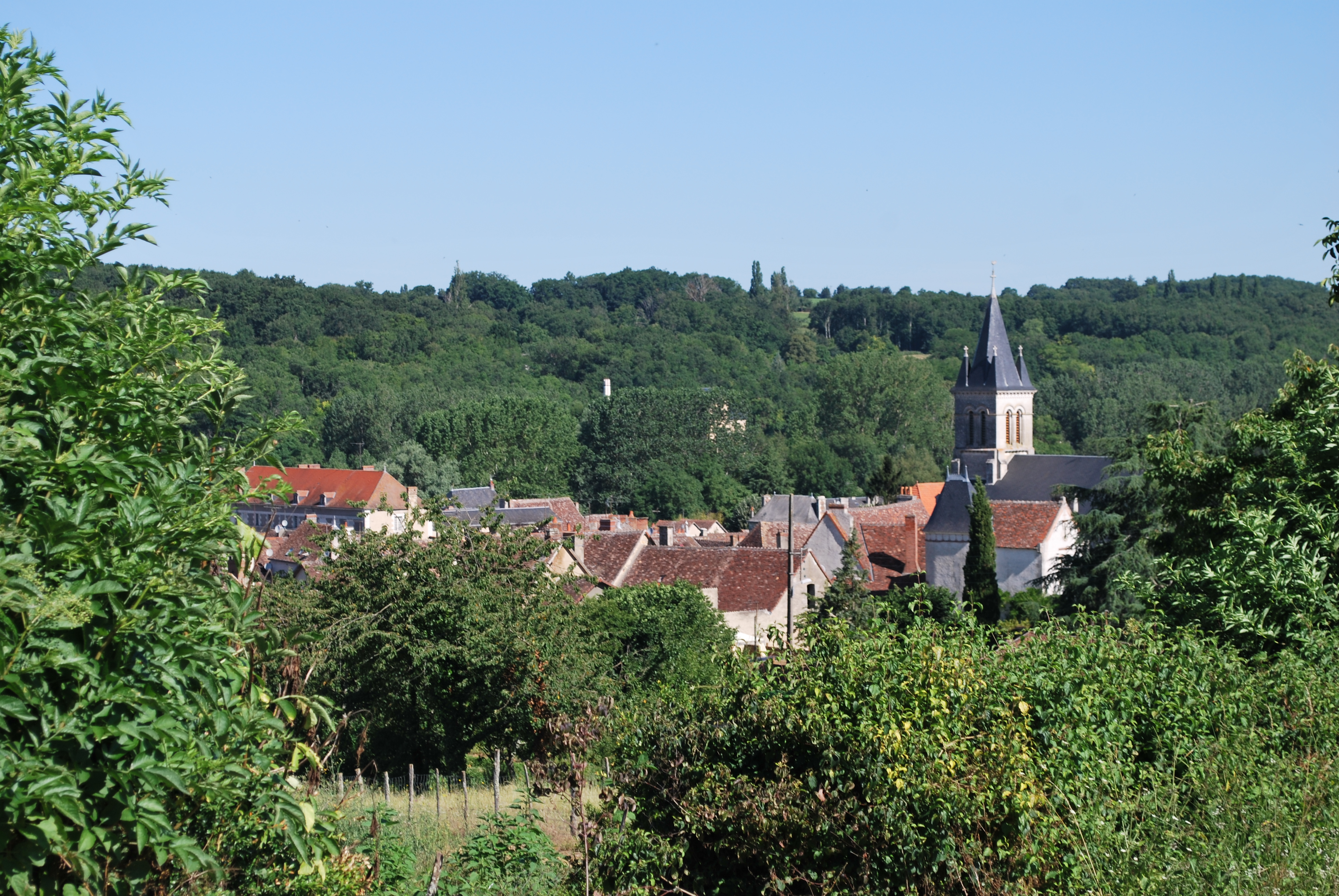 Vue du haut du Village de Saint-Pierre-de-Maillé dans la Vienne, en France